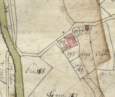 El Pont de Fullà en el Cadastre napoleònic del 1812 (Arxius Departamentals dels Pirineus Orientals)